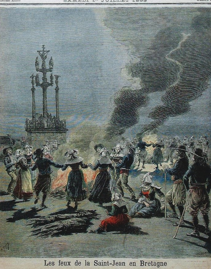 Les feux de la Saint-Jean en Bretagne (journal "Le Petit Parisien" du 1-07-1893, dessin). Calvaire de Saint-Thégonnec.